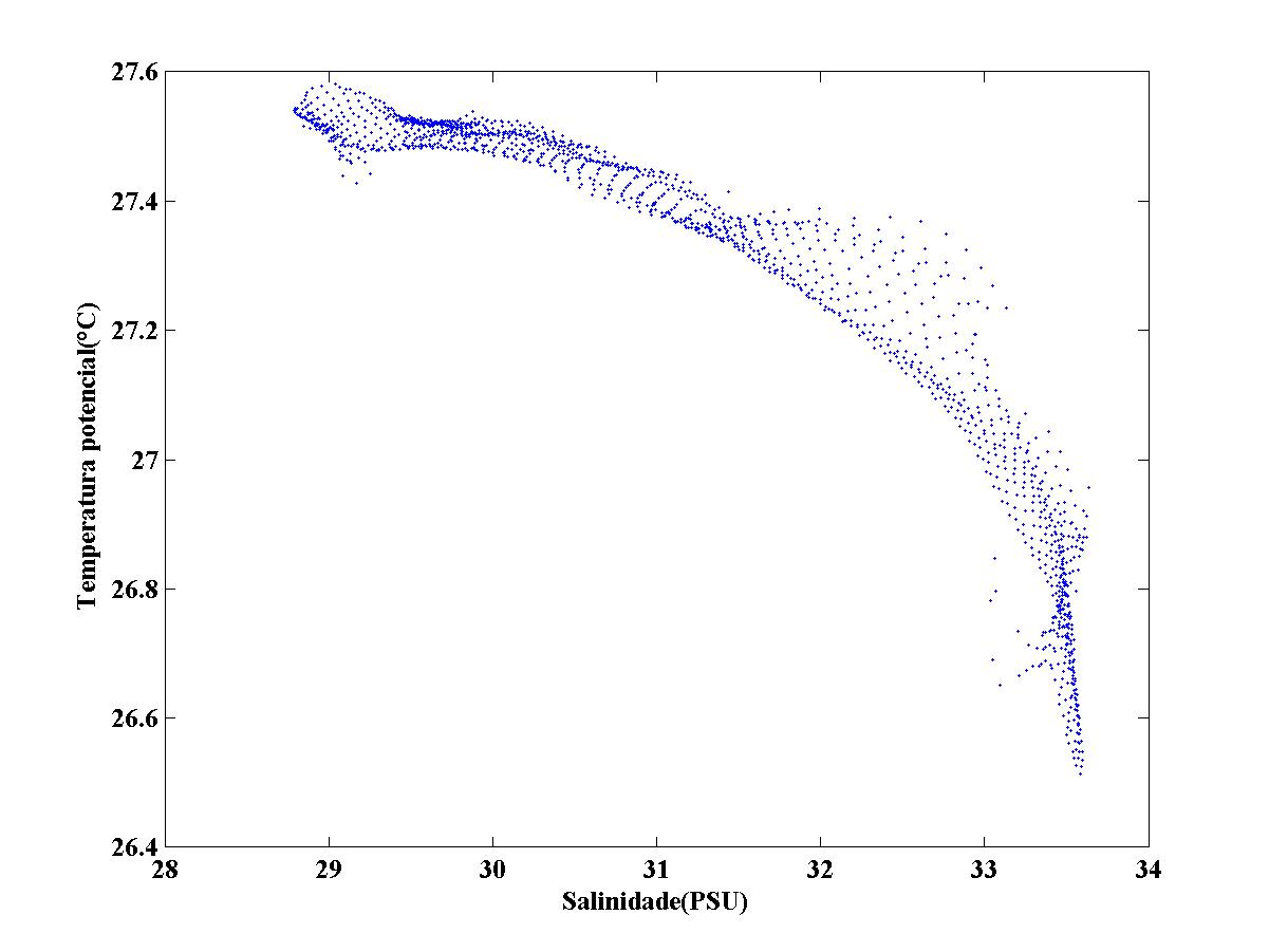 Diagrama T-S obtidos a 2 m de profundidade do modelo ROMS nas latitudes 1°S-6°N e 3°E-10°E intervalos longitudes